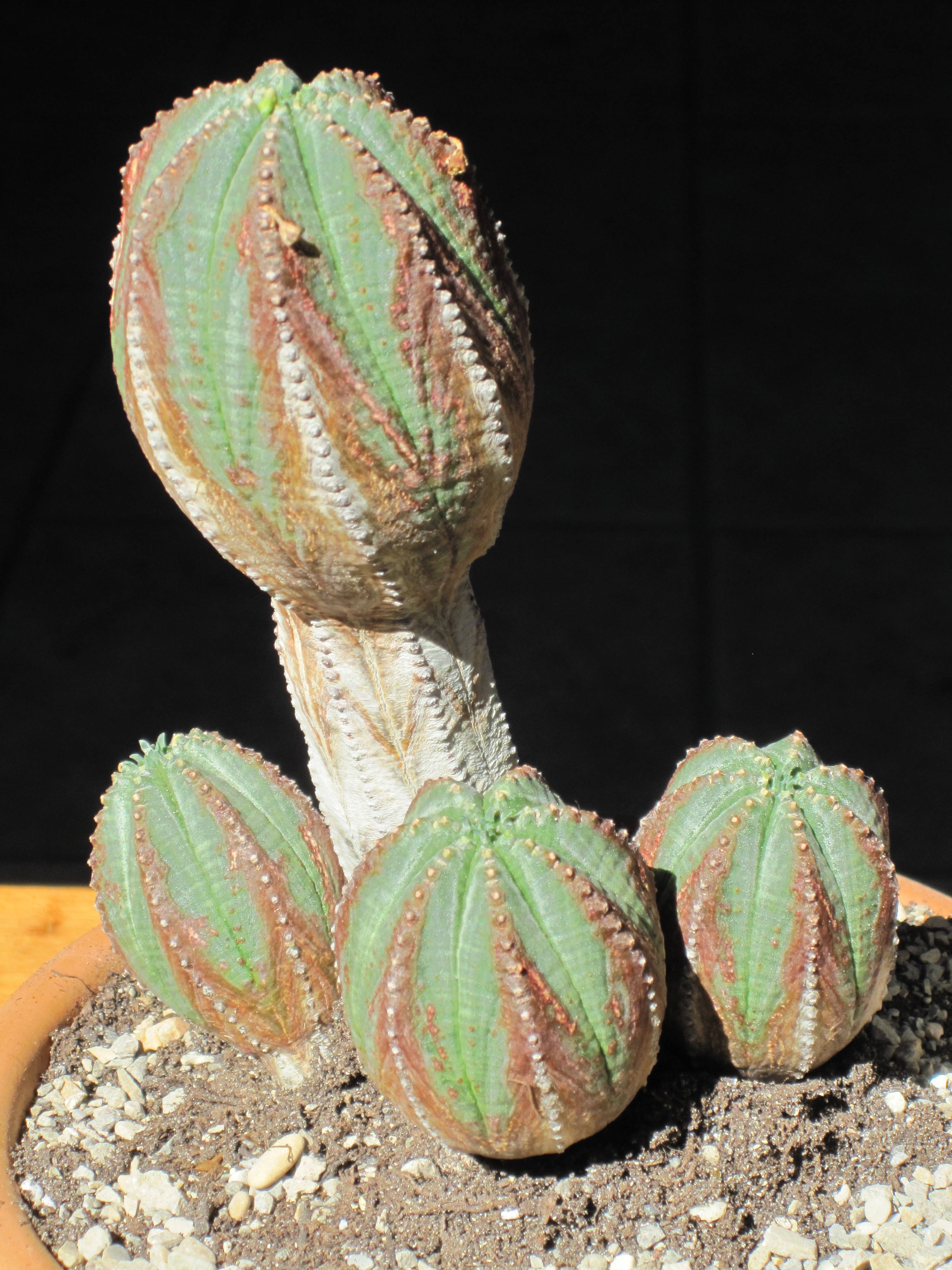 Euphorbia hybrid, one parent being E. obesa rather than E. meloformis